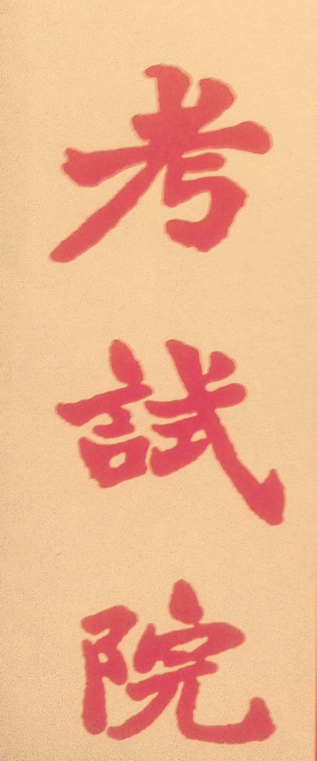 考試院於信封上的書寫體